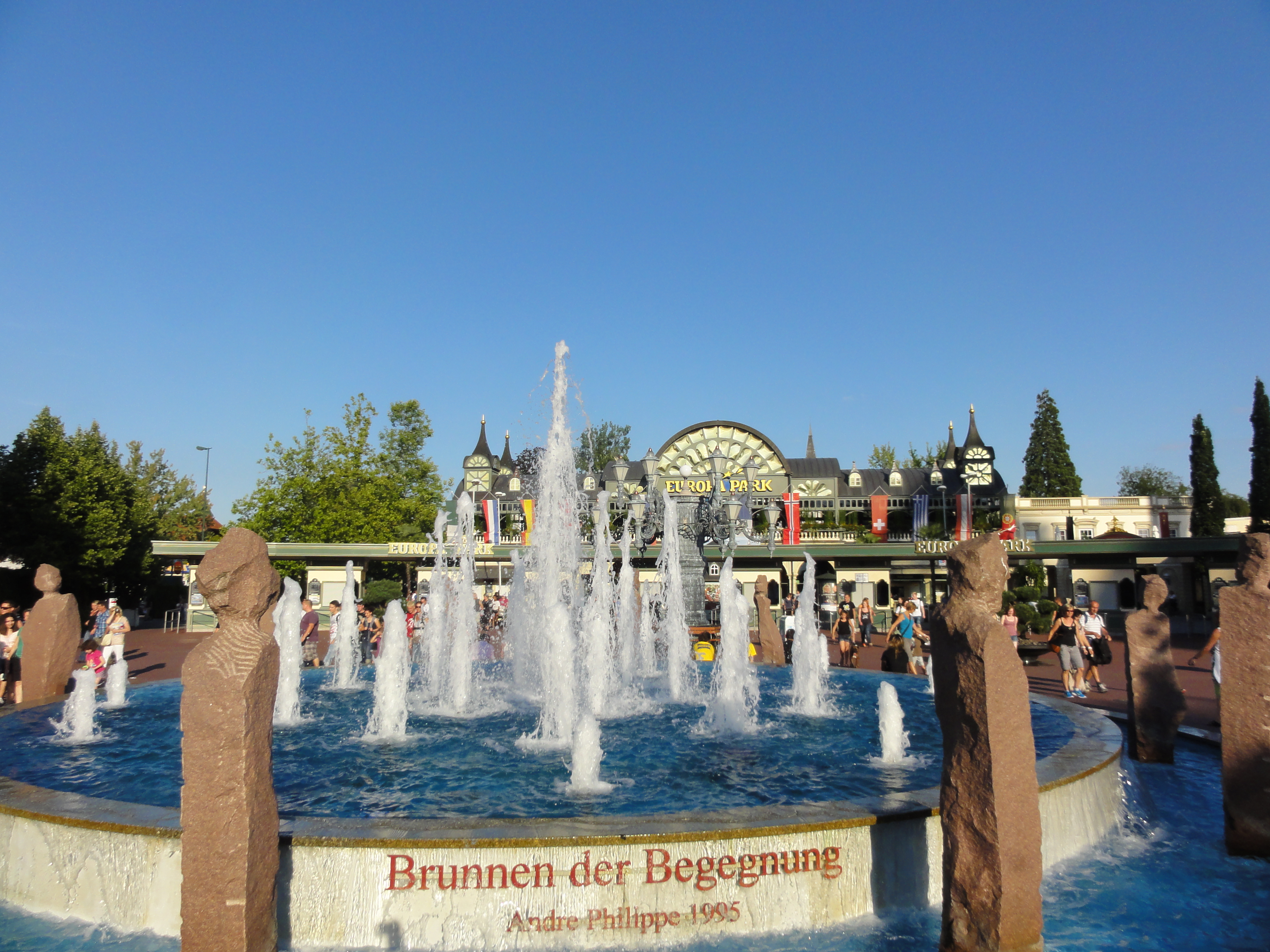 Entrée du parc Europa-Park, Rust, Bade-Wurtemberg, Allemagne.